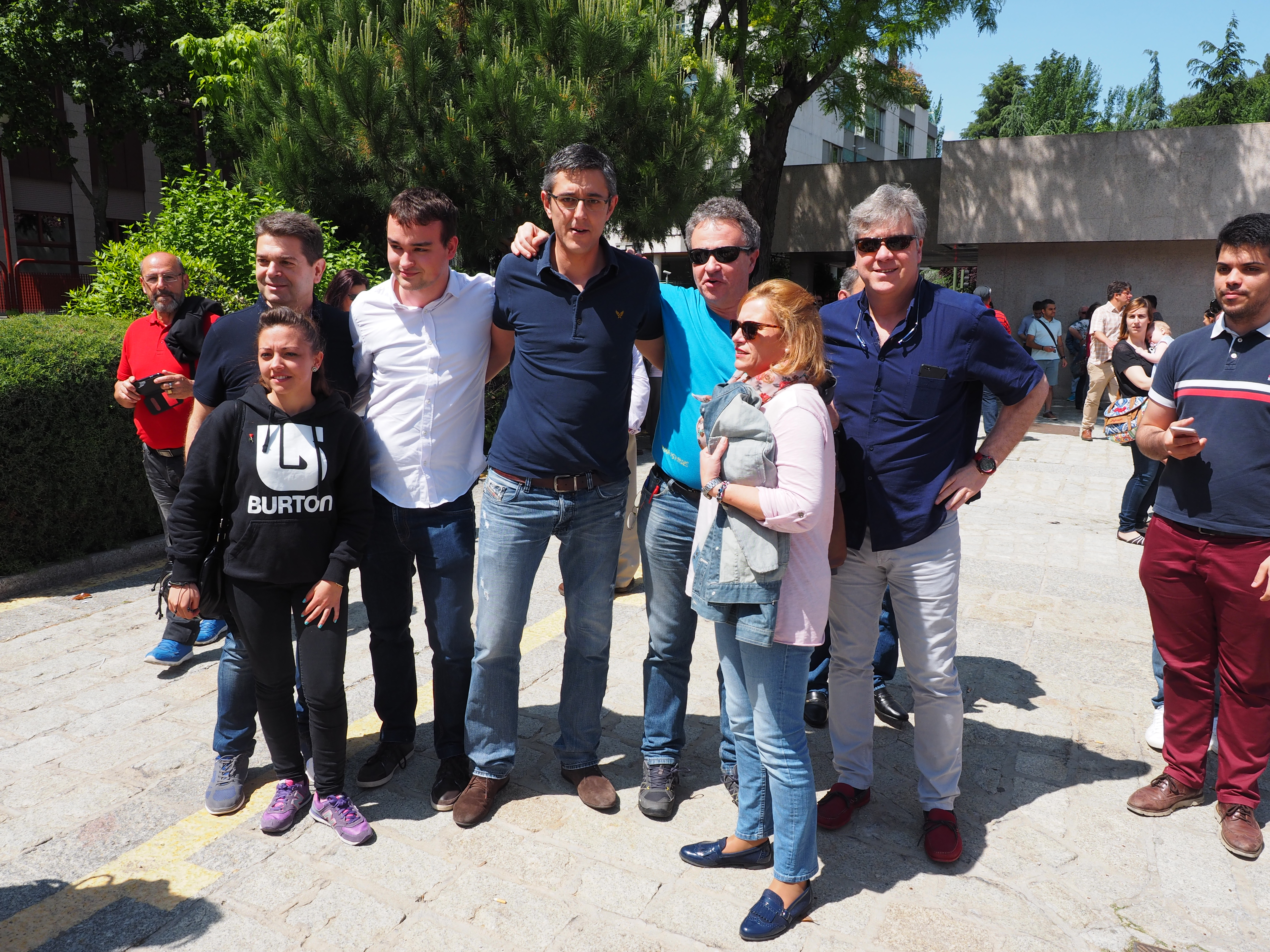 Eduardo Madina rencontrant un groupe de militants socialistes le 22 mai 2016 en vue des élections générales du 26 juin.